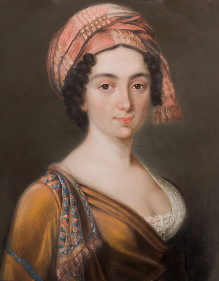 Mathilda d'Orozco